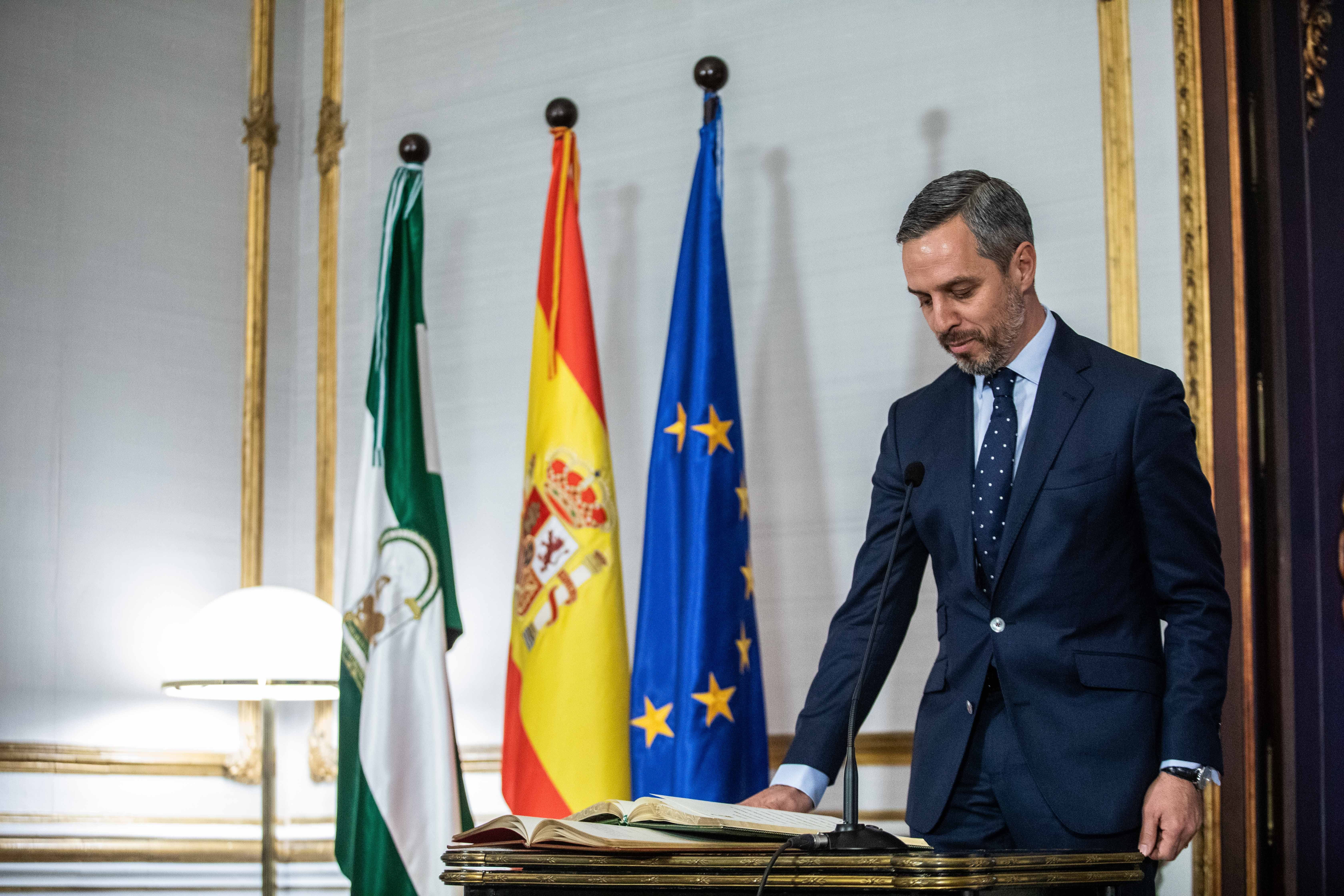 El consejero de Hacienda, Industria y Energía, Juan Bravo Baena.